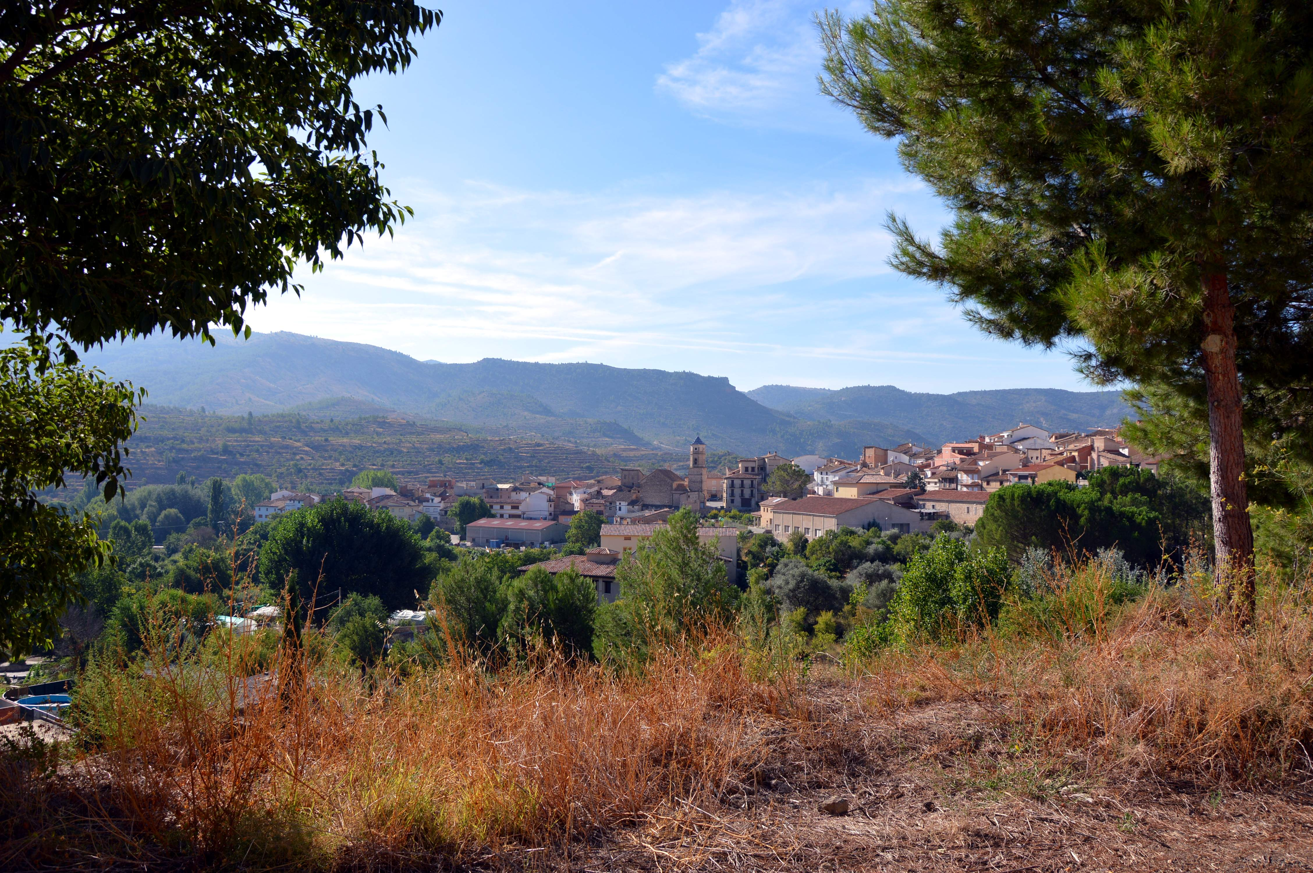 Vista parcial de Casasaltas (Valencia), desde la CN-330a.